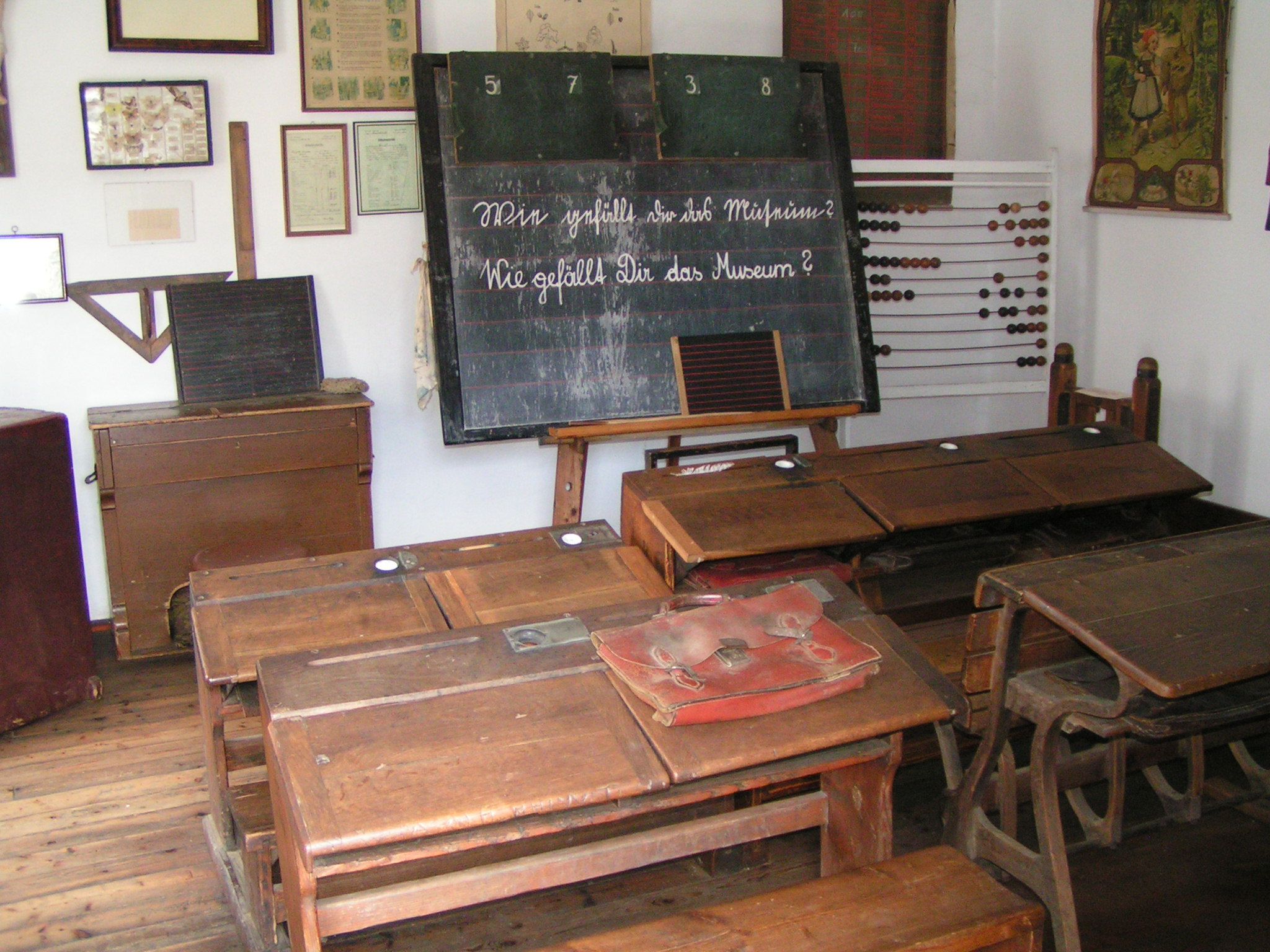 Dorfmuseum Mönchhof: Schulraum